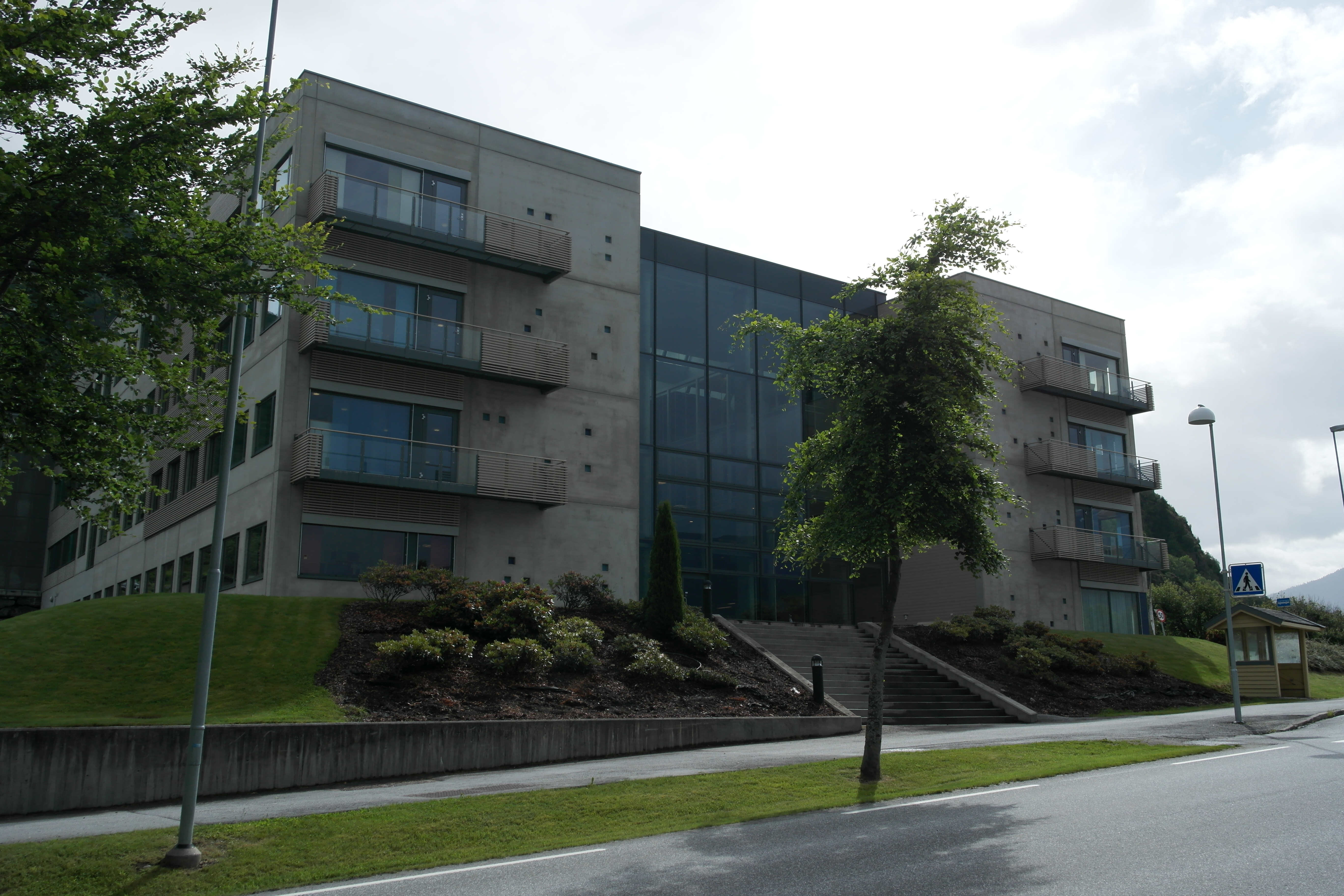 I Statens Hus på Hermansverk i Leikanger kommune held Fylkesmannen i Sogn og Fjordane til.